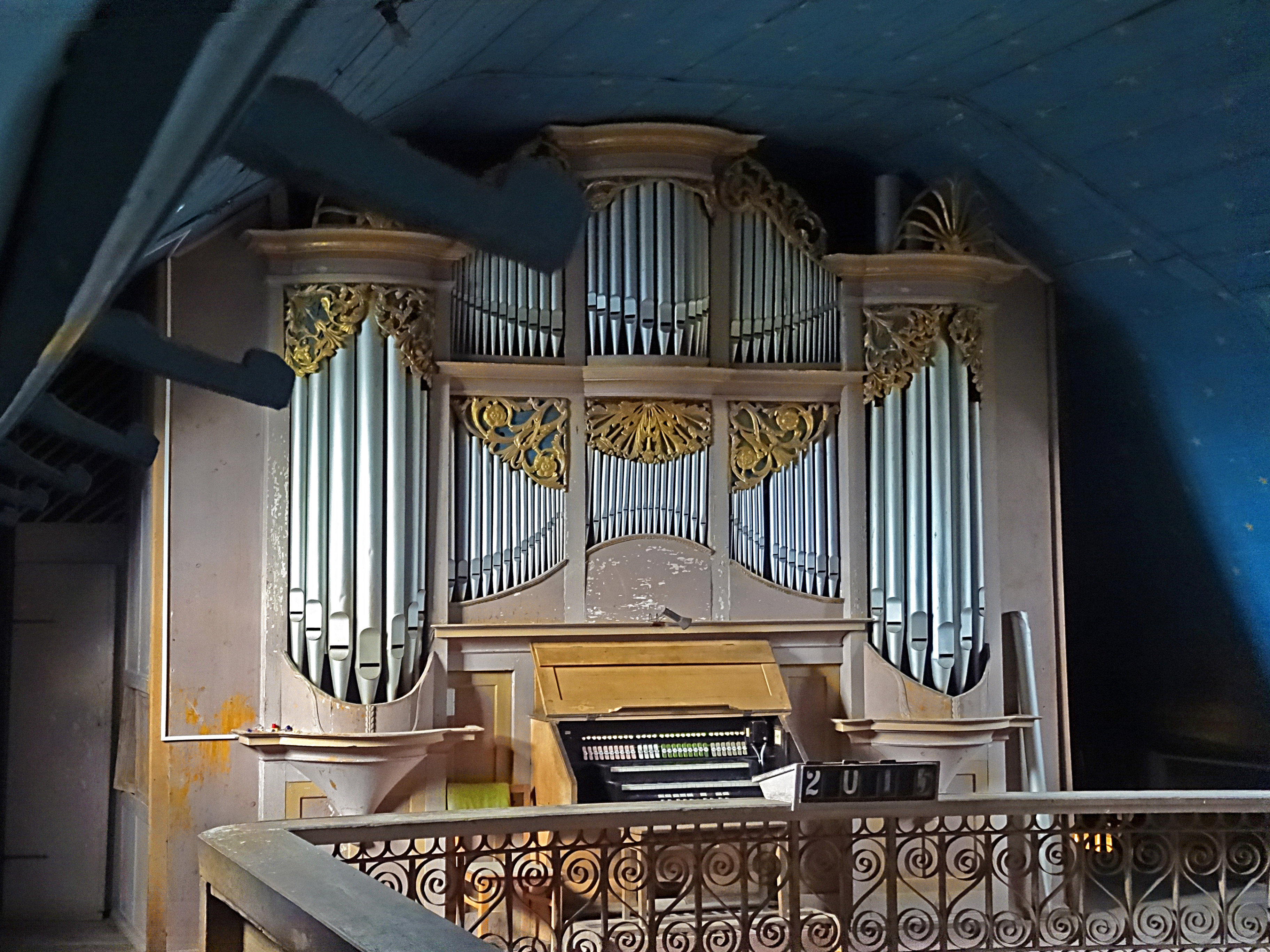 St. Peter und Paul Großmonra, Kiessling-Orgel von 1896 im Gehäuse von Adam Eifert (1878) [1]